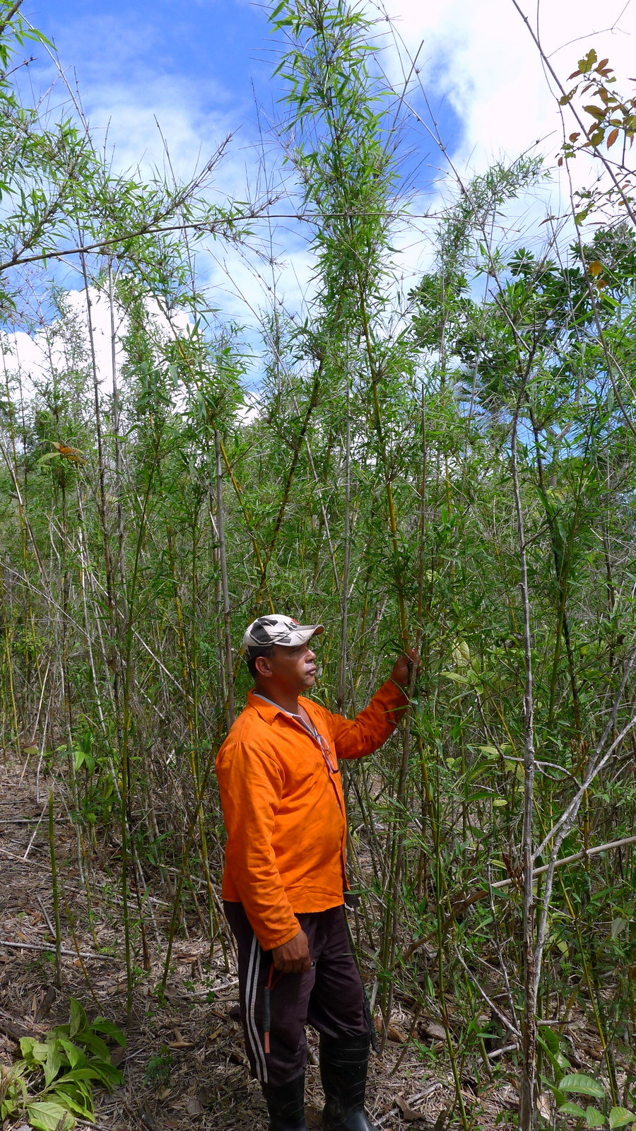 Guadua paniculata Munro